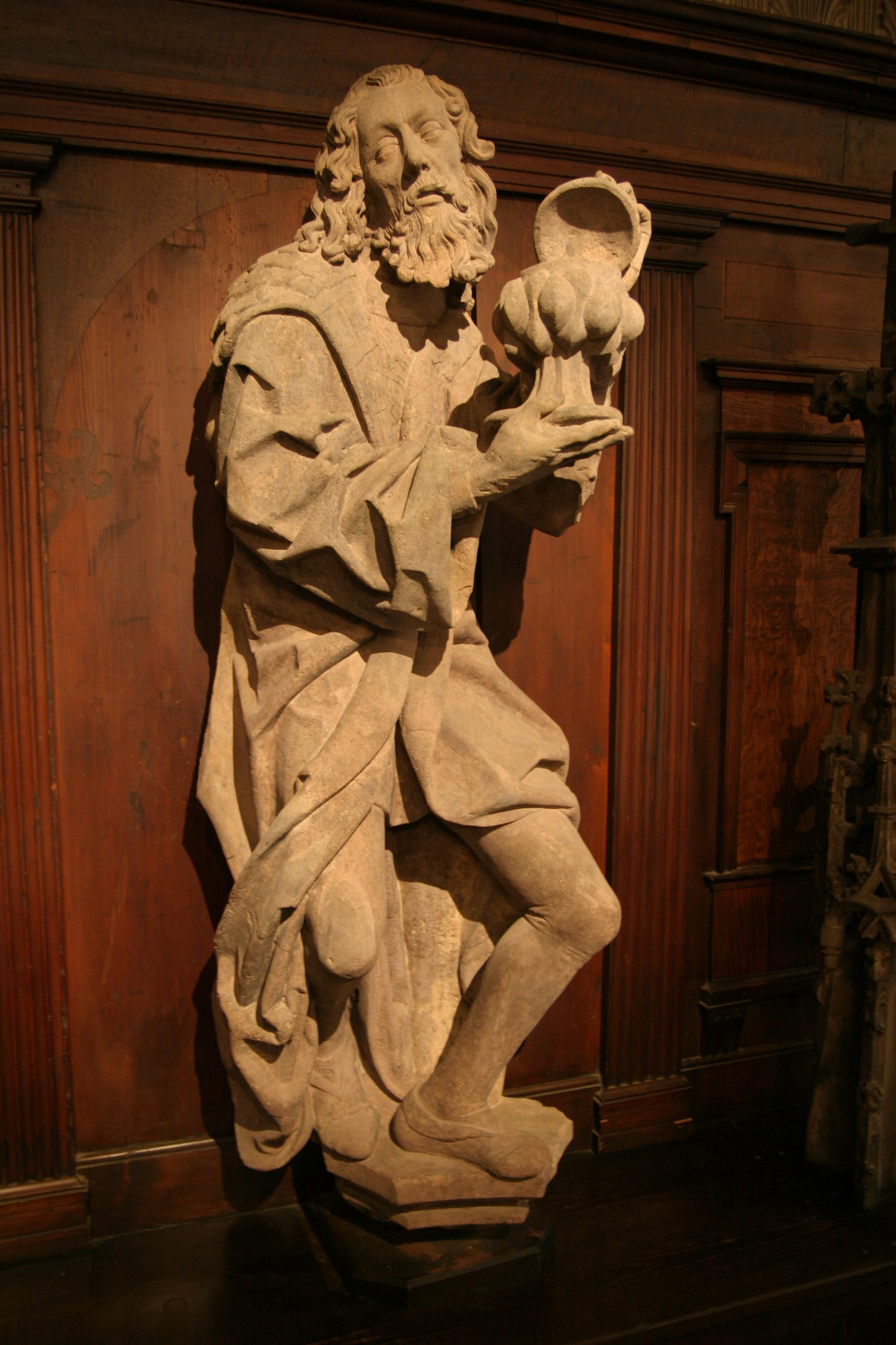 Musee de l Oeuvre Notre Dame Strasbourg